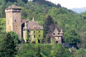 Chateau de Pesteils Polminhac (15) vue cavalière